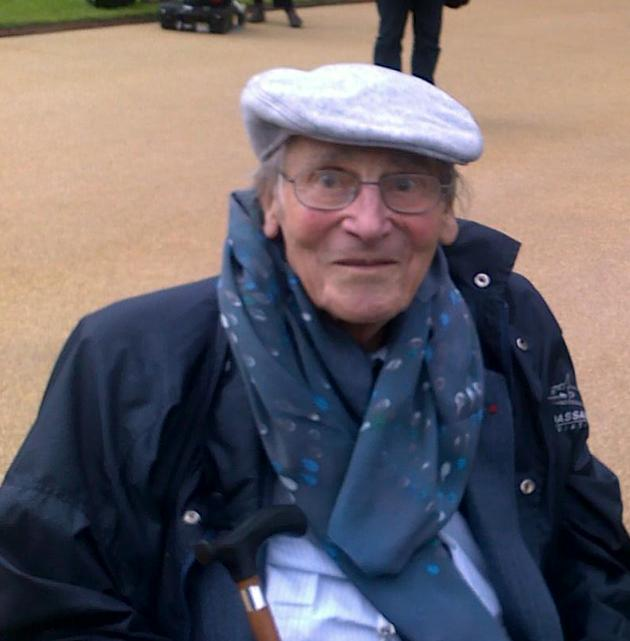 Albert Messiah aux cérémonies du 70° anniversaire de l'appel du Général de Gaulle, 18 juin 2010, Chelsea Royal Hospital (Londres)